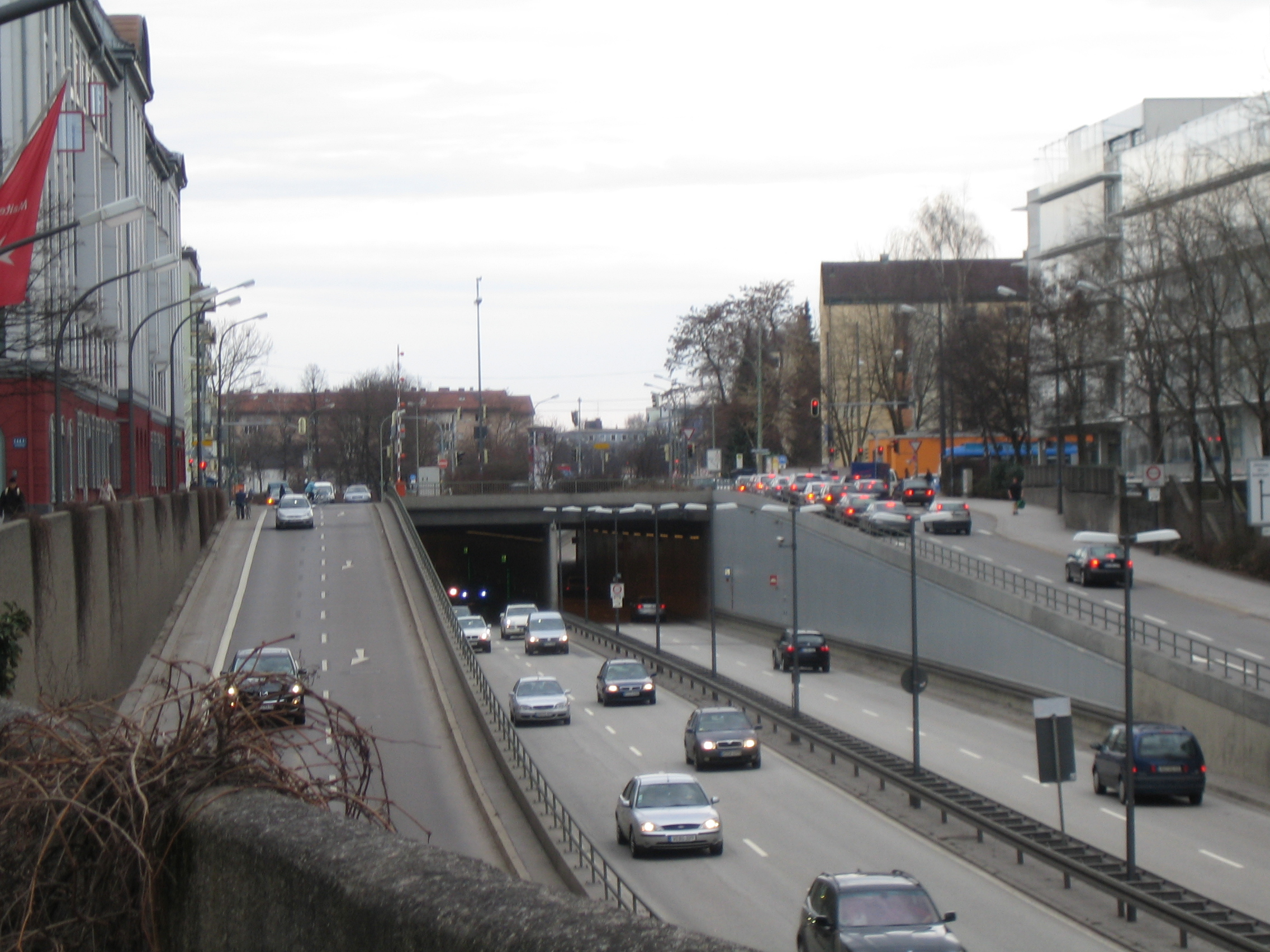 Nordportal des Innsbrucker-Ring-Tunnels in München